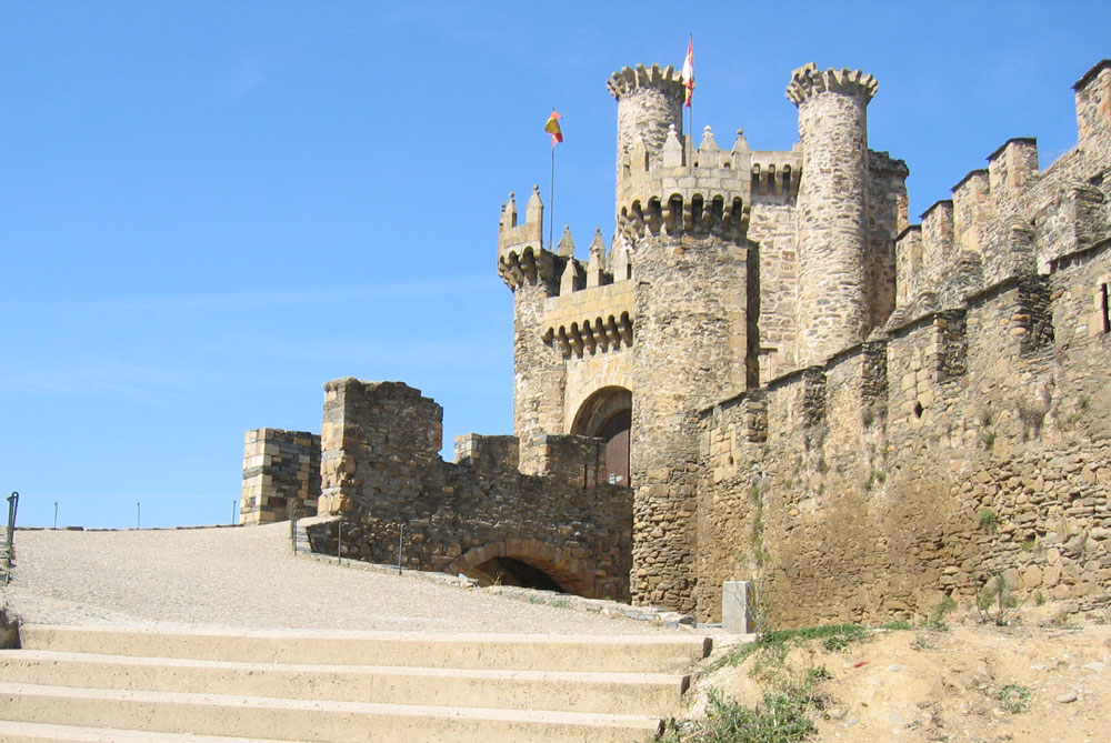 Castillo de los Templarios. Ponferrada, León, España. Fotografia por Alejandro Bolado